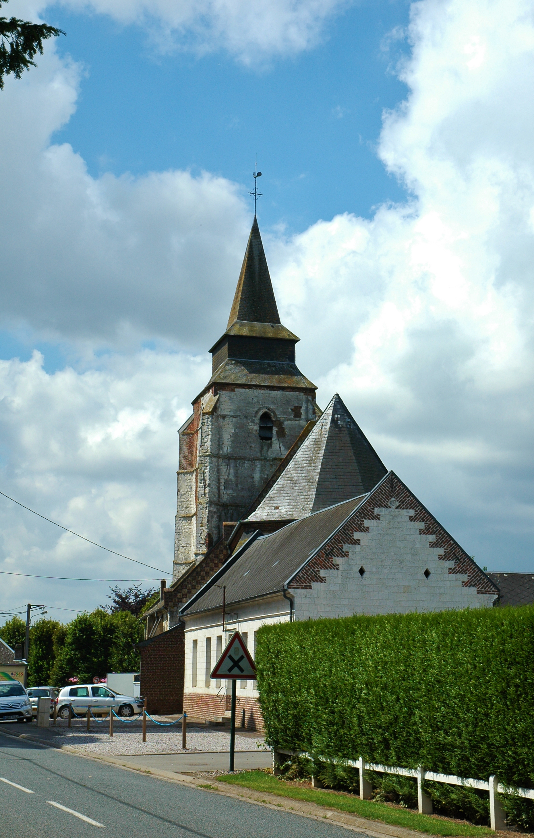 L'église de Saulty.